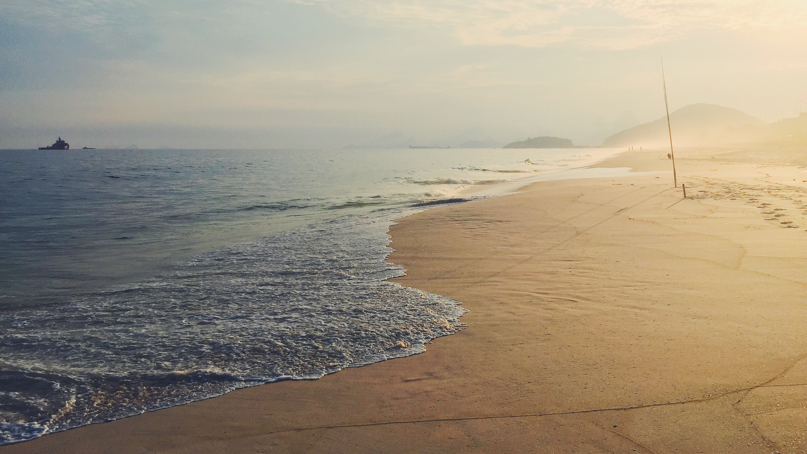 Praia de Piratininga, Niterói